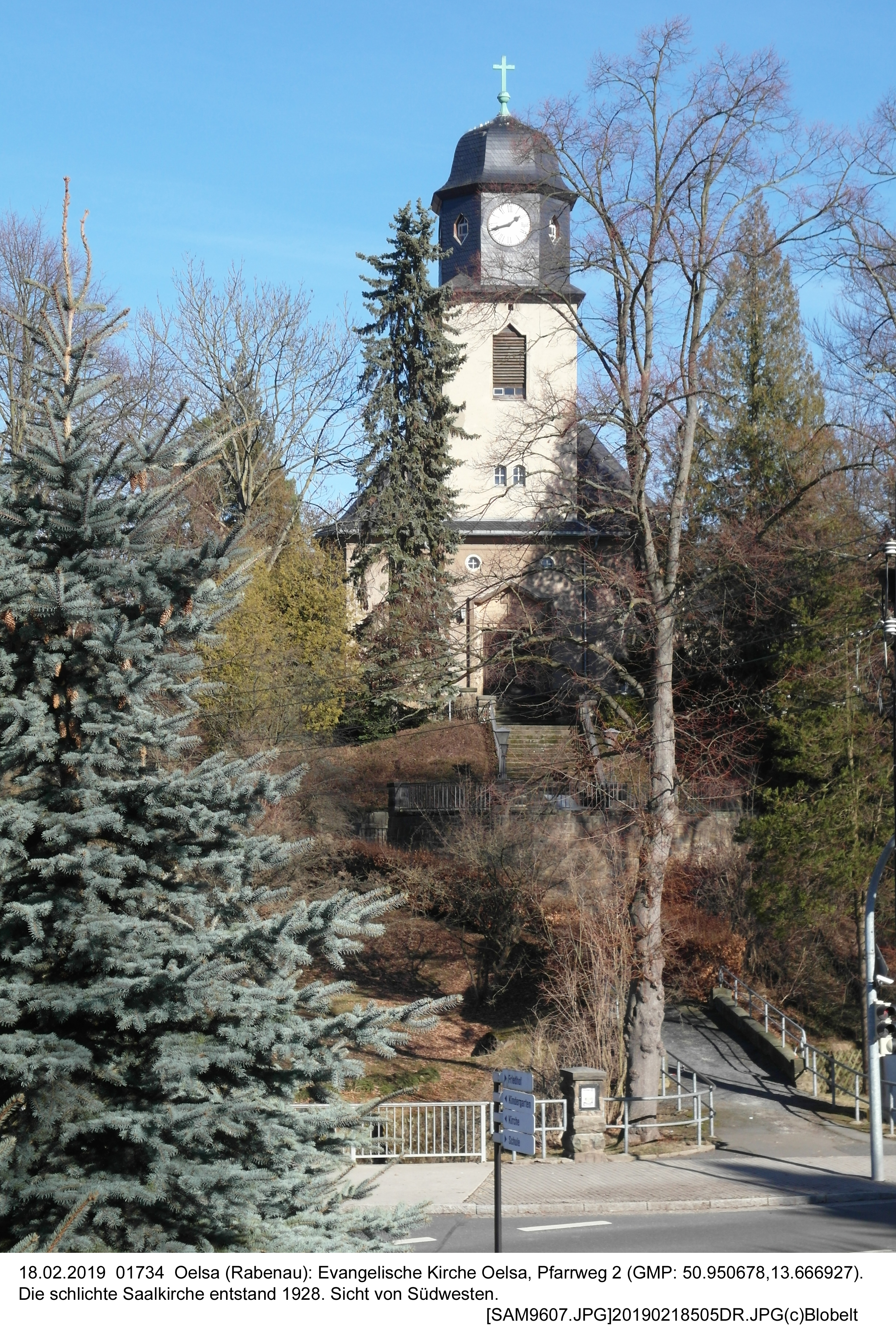 18.02.2019 01734 Oelsa (Rabenau): Evangelische Kirche Oelsa, Pfarrweg 2 (GMP: 50.950678,13.666927). Die schlichte Saalkirche entstand 1928. Sicht von Südwesten. [SAM9607.JPG]20190218505DR.JPG(c)Blobelt